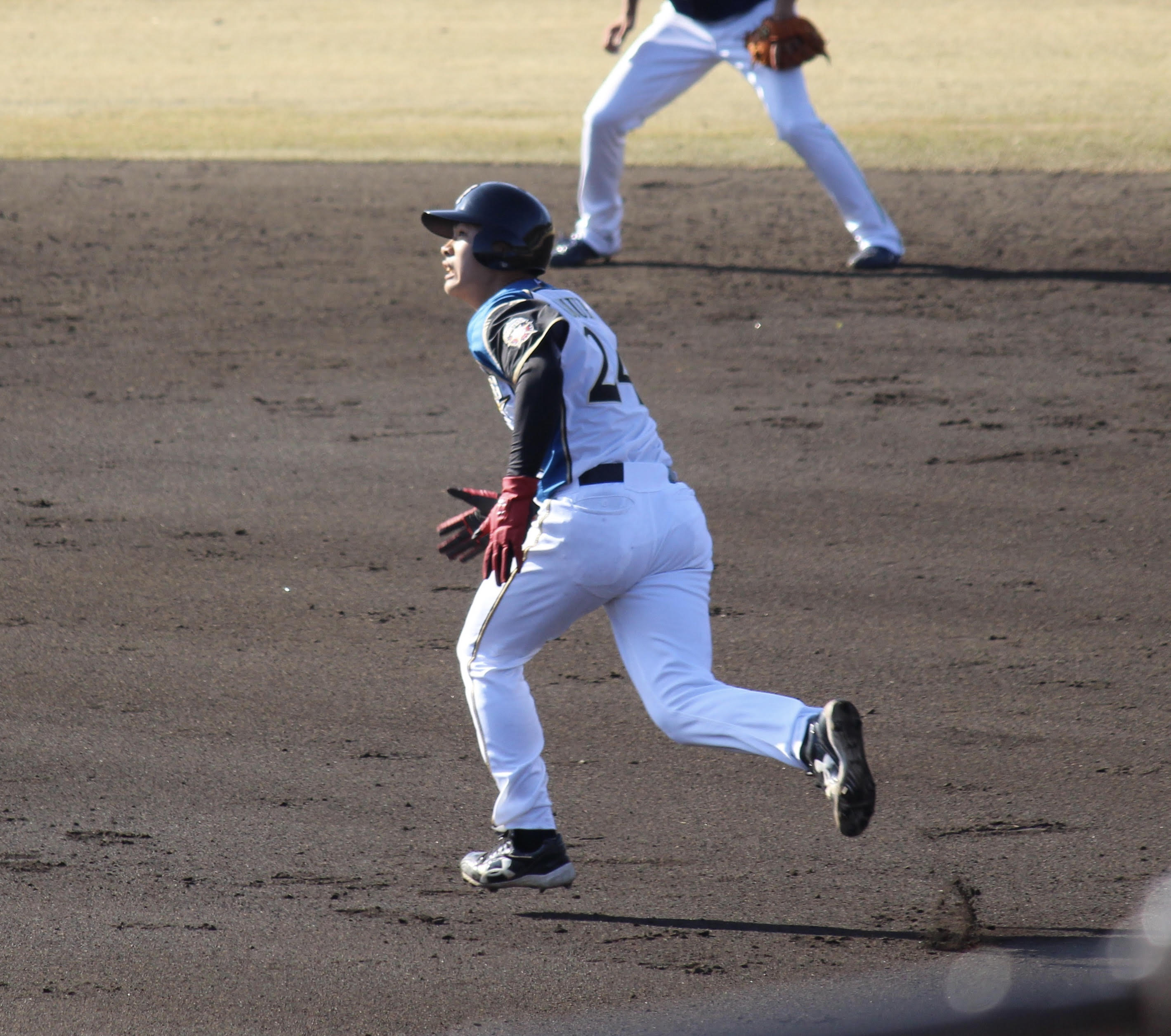 2019年3月21日ファイターズ鎌ヶ谷スタジアムにて